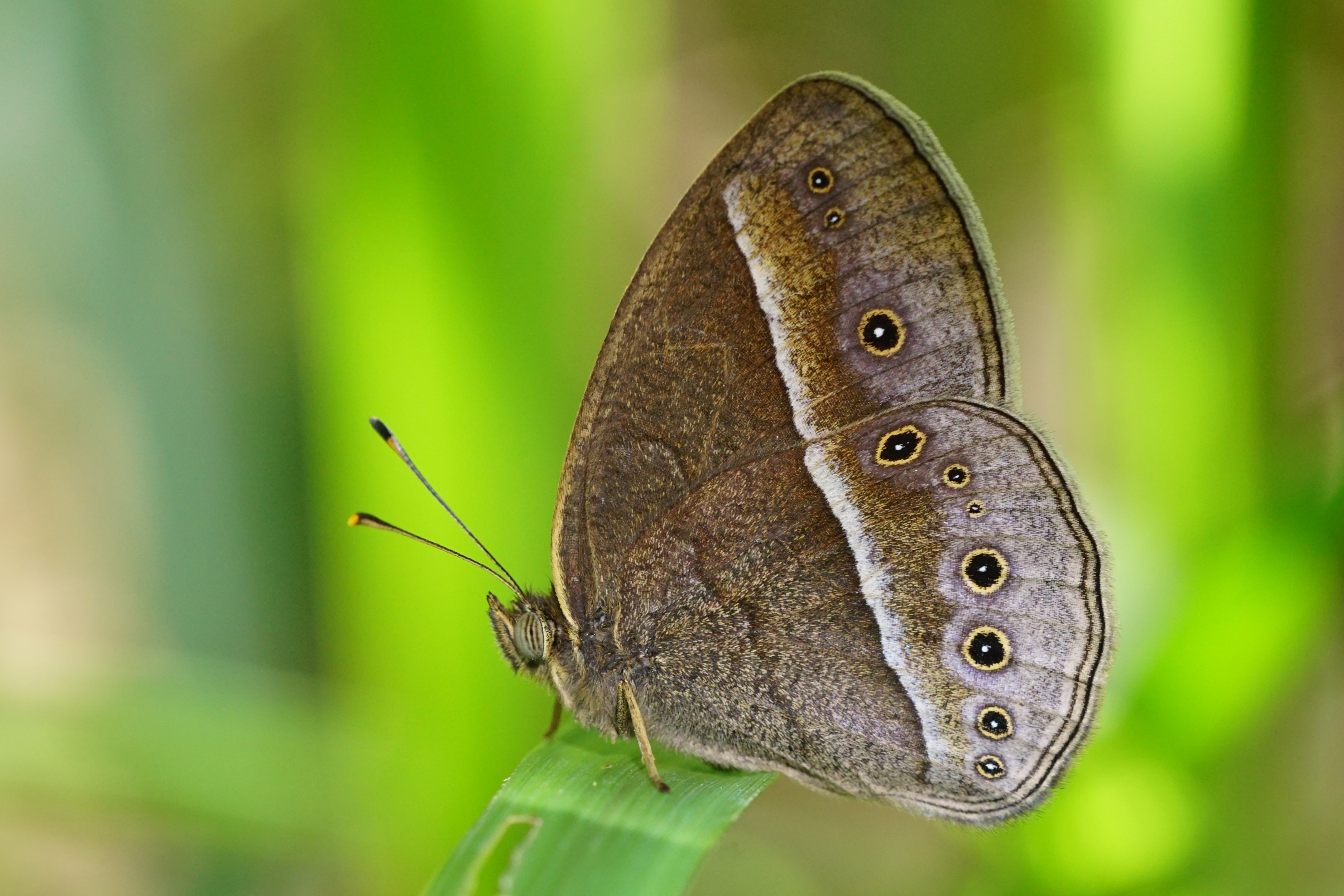 中文（台灣）: 淺色眉眼蝶 Mycalesis sangaica mara （乾季型）